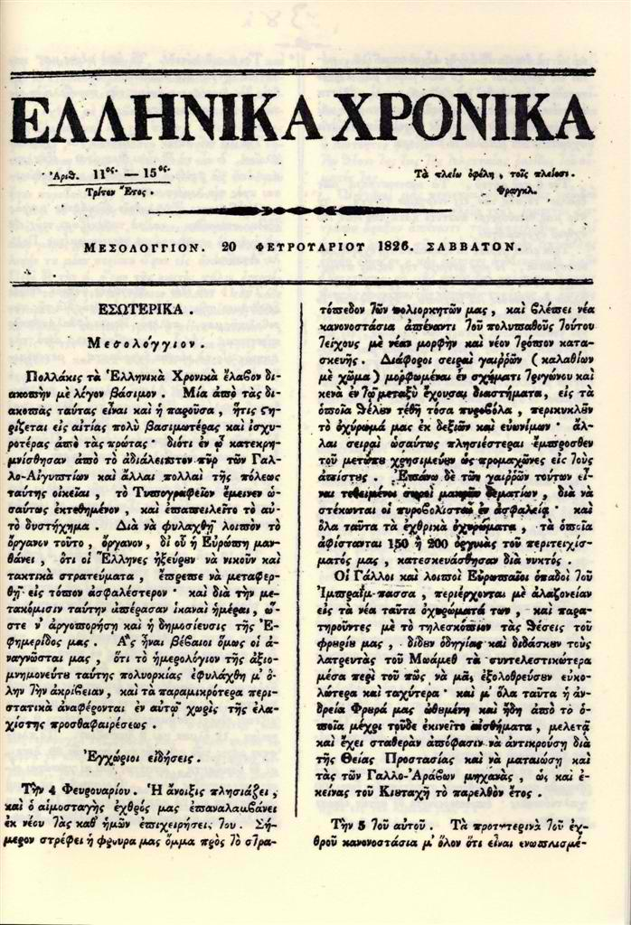 Вестник "Елиника Хроника"